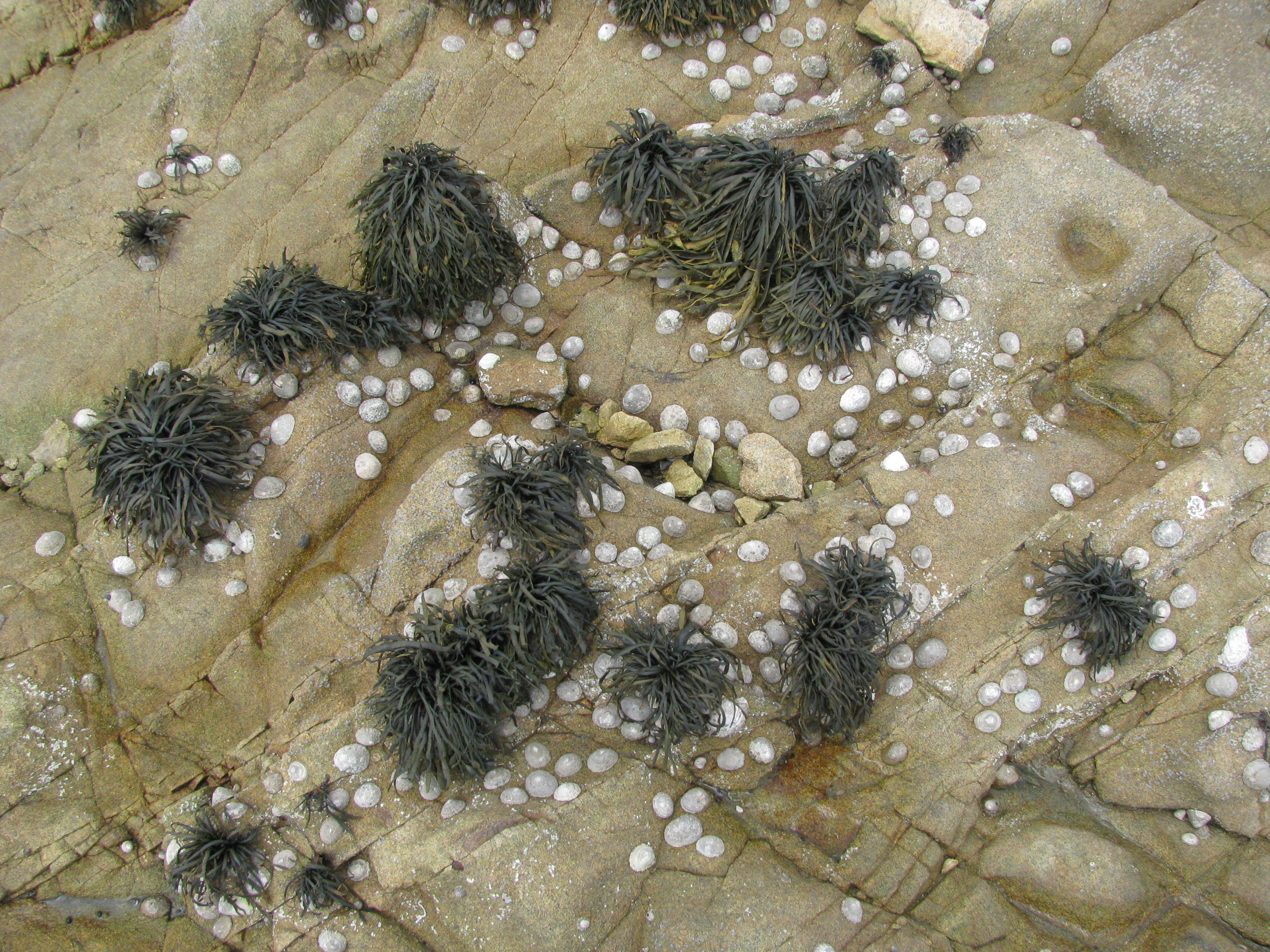 Patella vulgata s'attaquant à des touffes d'ascophylles. Noter qu'en dehors des algues dont la longueur est considérablement réduite, la surface de la roche est parfaitement nue.